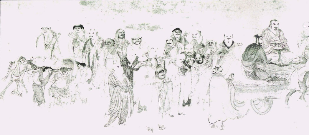 Cinq cents arhat, section d'un rouleau portatif, encre et couleur claire sur papier, du peintre chinois Wu Bin,Template:Sp-. Actif: 1573-1620. Musée: Cleveland Museum of Art.